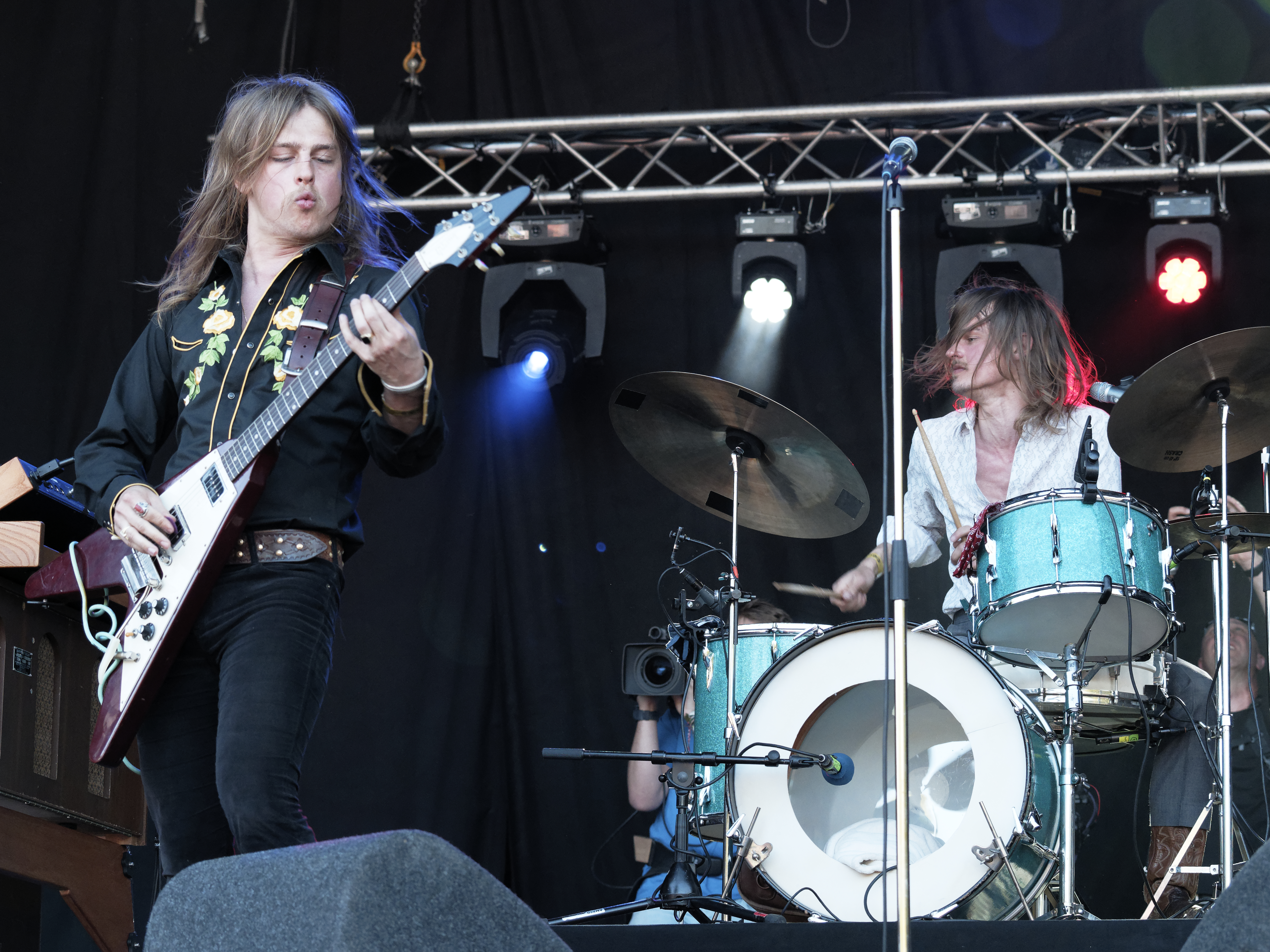 Pablo van de Poel en Luka van de Poel